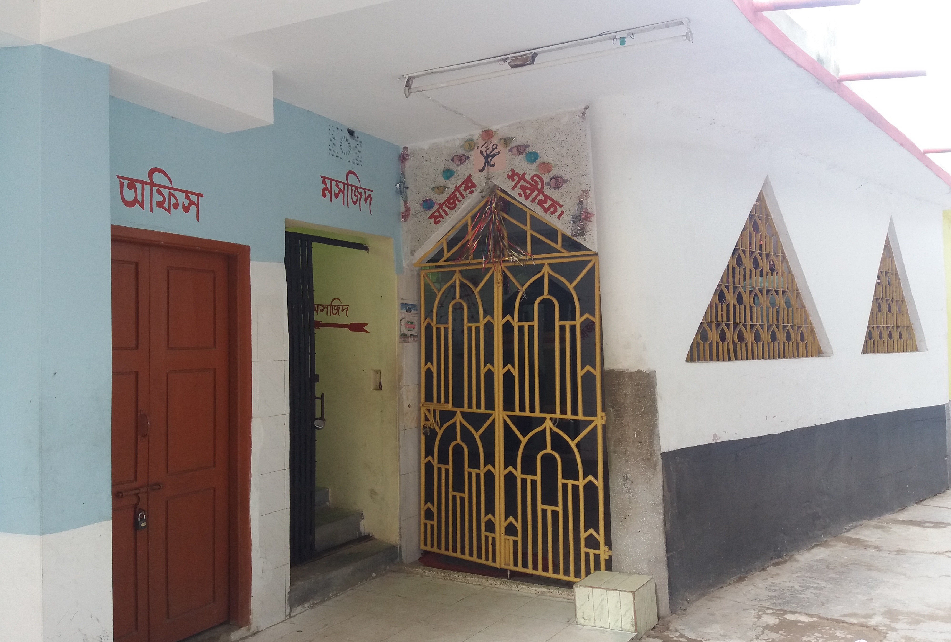 তুরকান শাহ এর মাজার